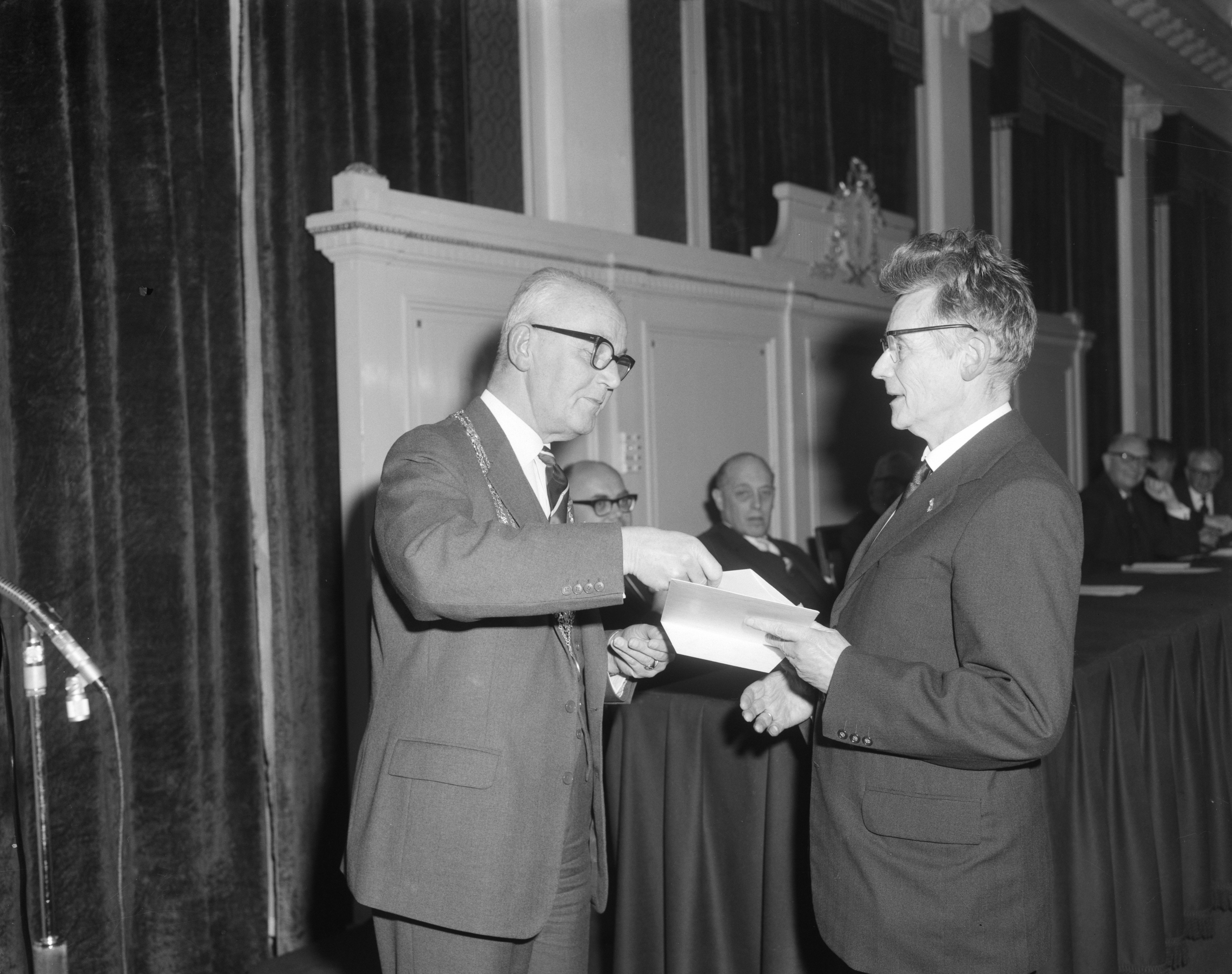 Prijsuitreiking Jan Campertprijs in Den Haag, Hendrik de Vries en burgemeester Kolfschoten. Datum 19 december 1962